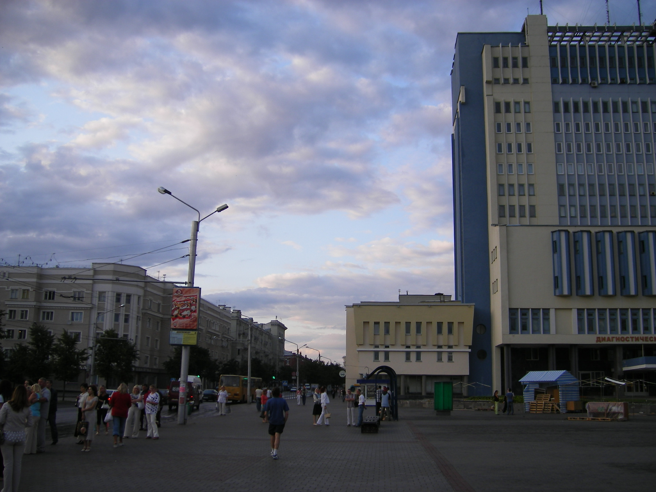 Mahilyow, Pervomayskaya street